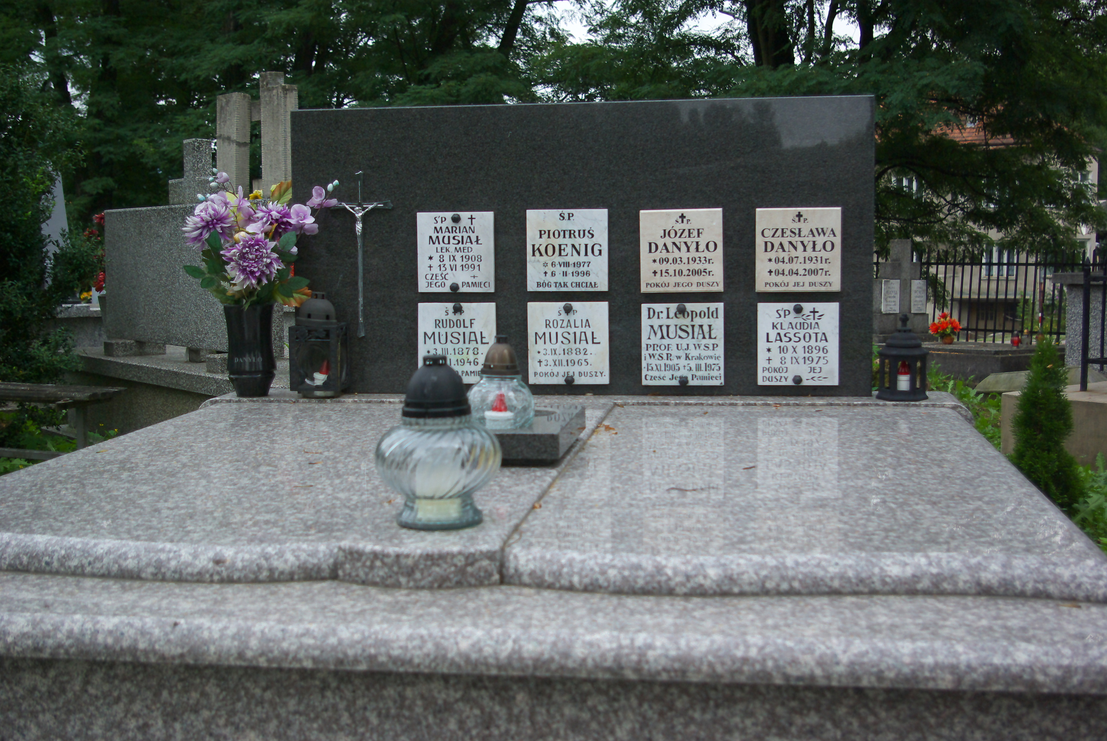 Grobowiec rodziny Musiał (oraz Danyło, Lassota) w części "Matejki Stary" Cmentarza Centralnego w Sanoku